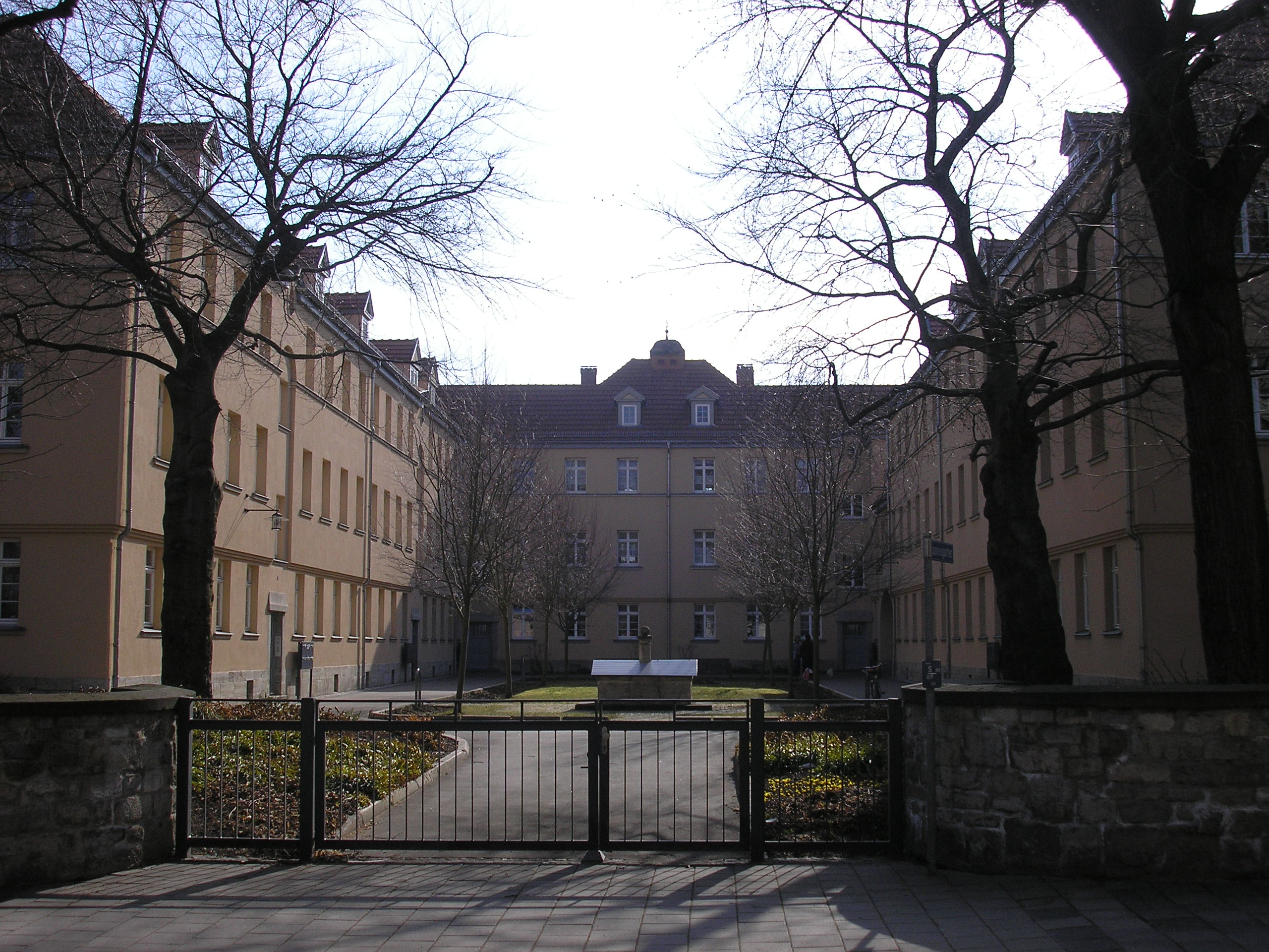 Die Wohnanlage Fasanengarten in Arnstadt (Thüringen).